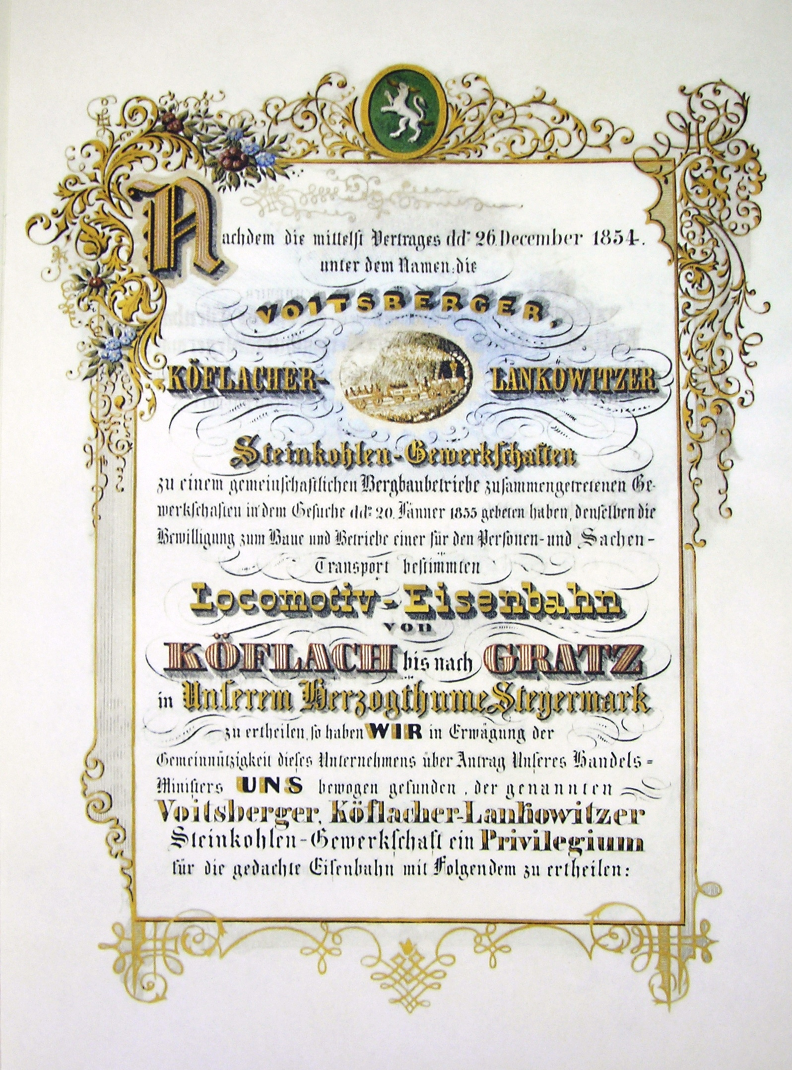 Foto der Seite 3 von 9 der Konzessionsurkunde für die Lokomotiv-Eisenbahn von Köflach nach Graz vom 26. August 1855